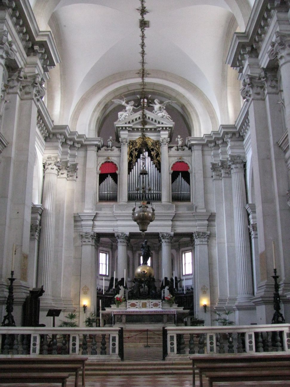 San Giorgio Maggiore (Venice)